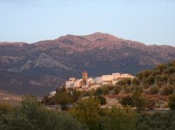 Quesada al atardecer con el Picón del Guante al fondo.